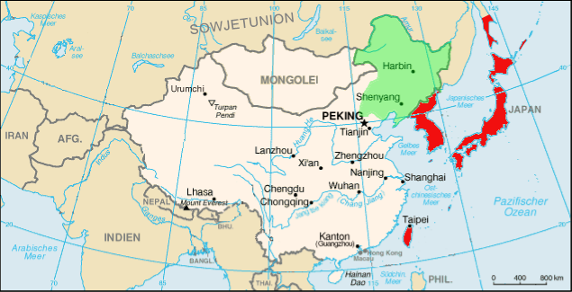 Aufbereitete Karte, um die Situation von Asien im Jahr 1930 wiederzugeben (rot ist Japan und andere Teile unter japanischer Kontrolle)